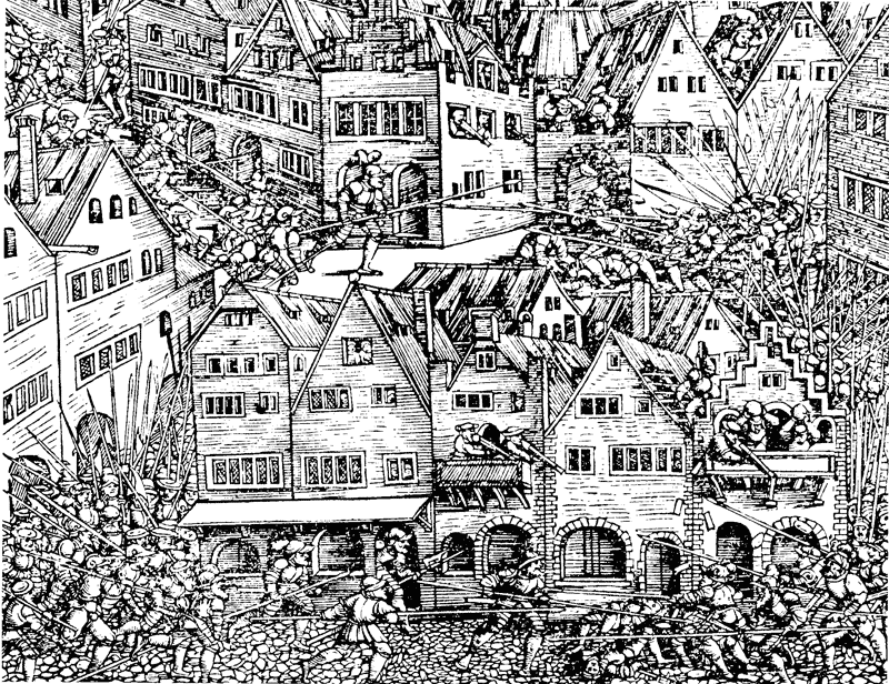 Die Mordnacht von Zürich 23./24. Februar 1350. Schweizerchronik des Johannes Stumpf, 1548